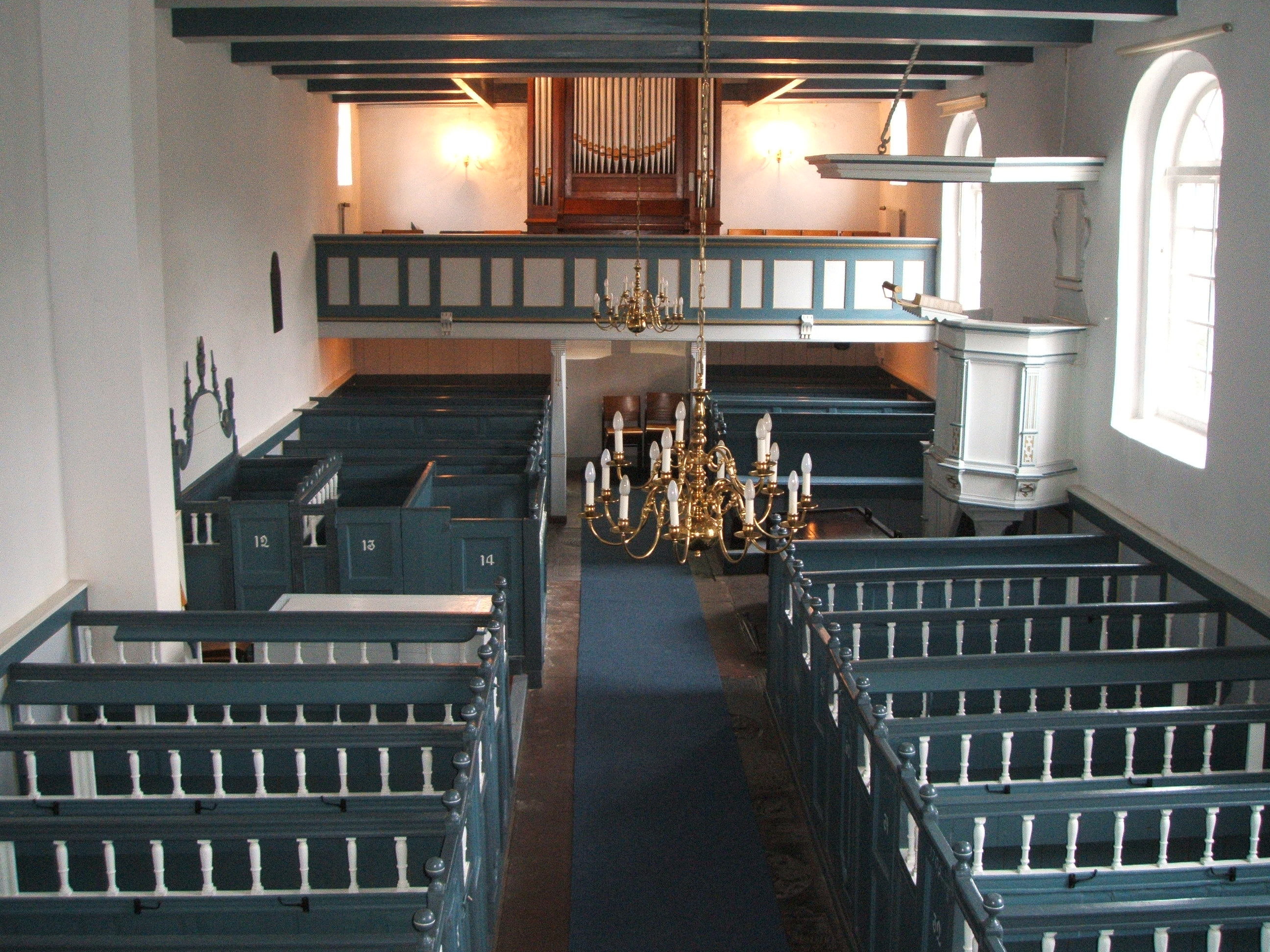 Innenraum der Alten Kirche Wybelsum, Emden, Ostfriesland